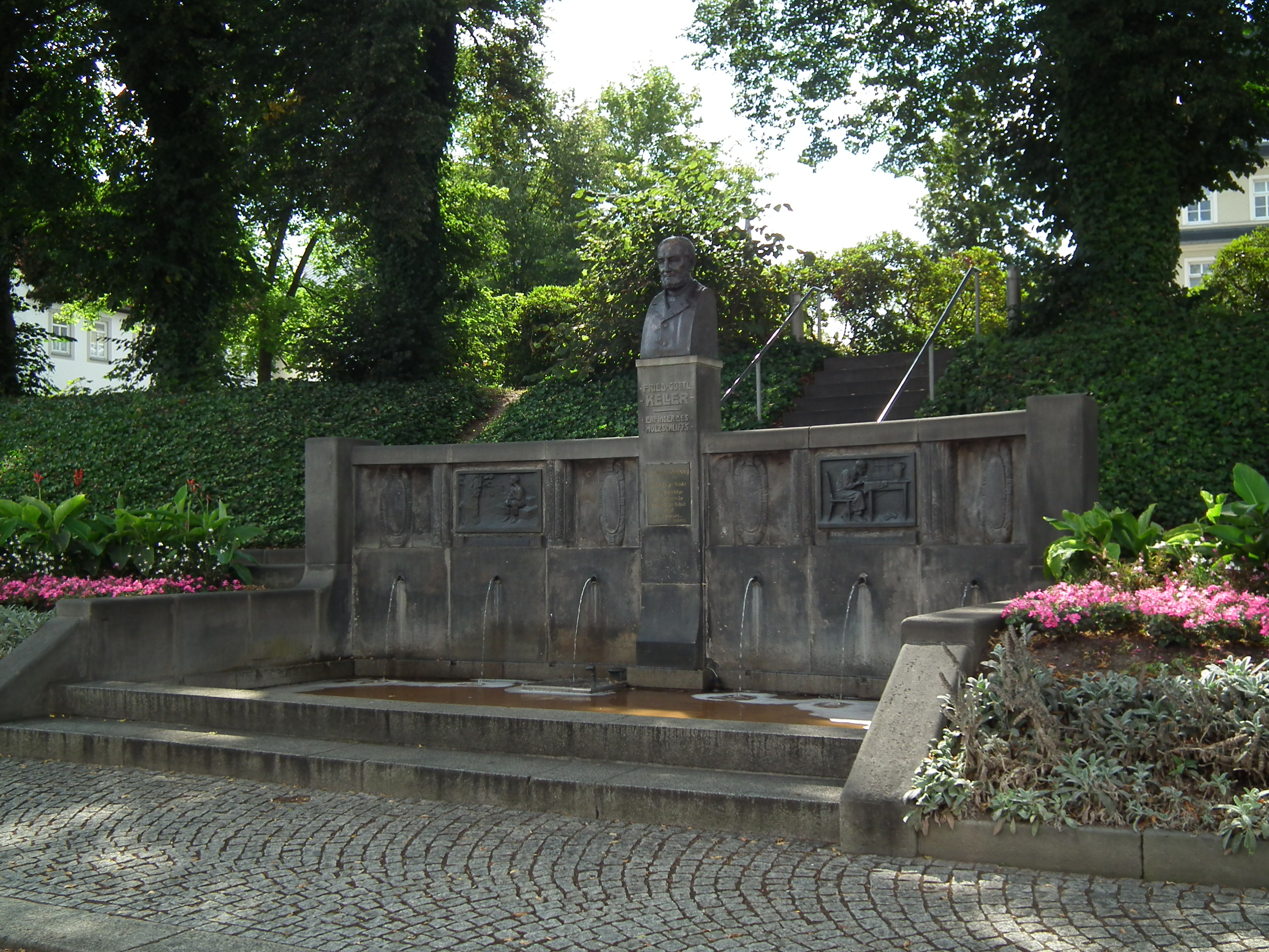 Hainichen